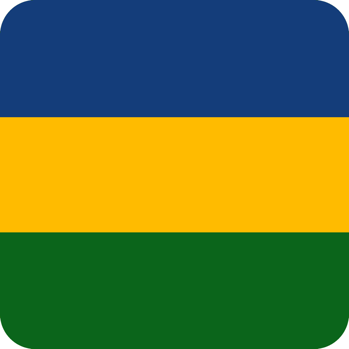 Icono de la bandera del Partido Auténtico Labrador, Costa Rica.